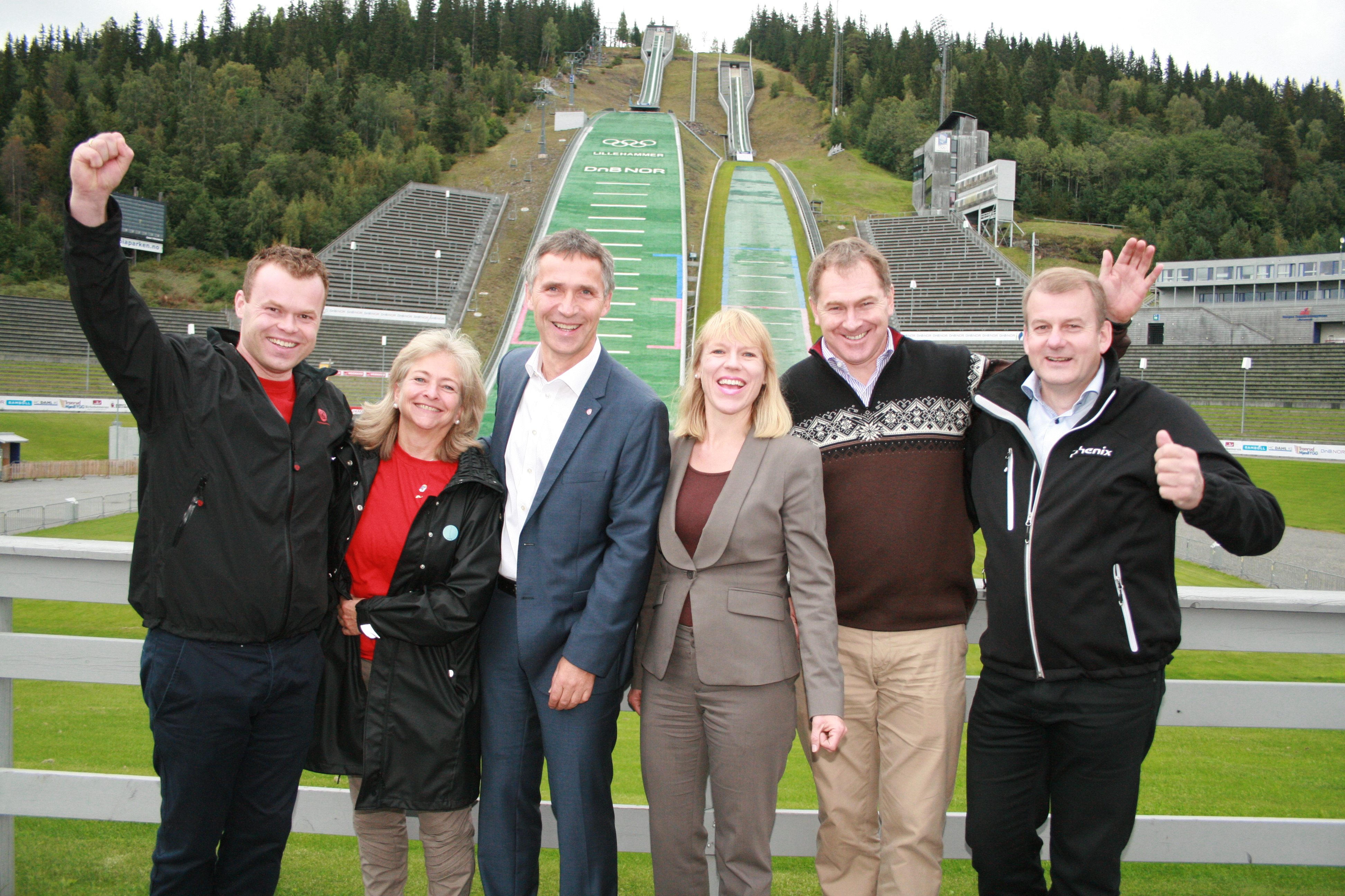 Jubel for statsgaranti. (Fra v.)Aps ordførerkandidat i Lillehammer Espen Johnsen, ordfører i Lillehammer Synnøve Brenden, statsminister Jens Stoltenberg, kulturminister Anniken Huitfeldt, generalsekretær i Norges idrettsforbund Inge Andersen og 1 visepresident i Norges Skiforbund Erik Røste. .